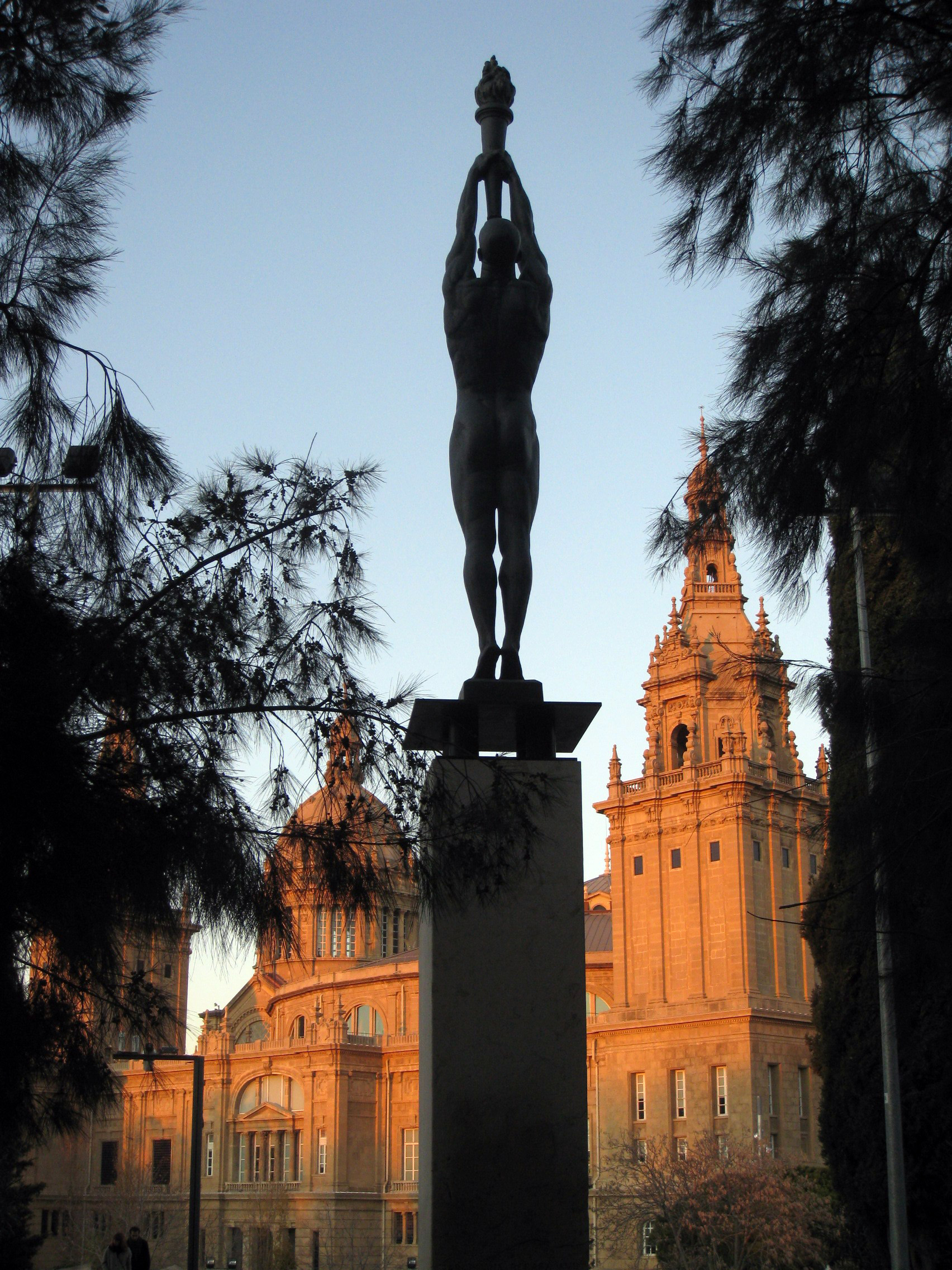 Palau Nacional (Barcelona)